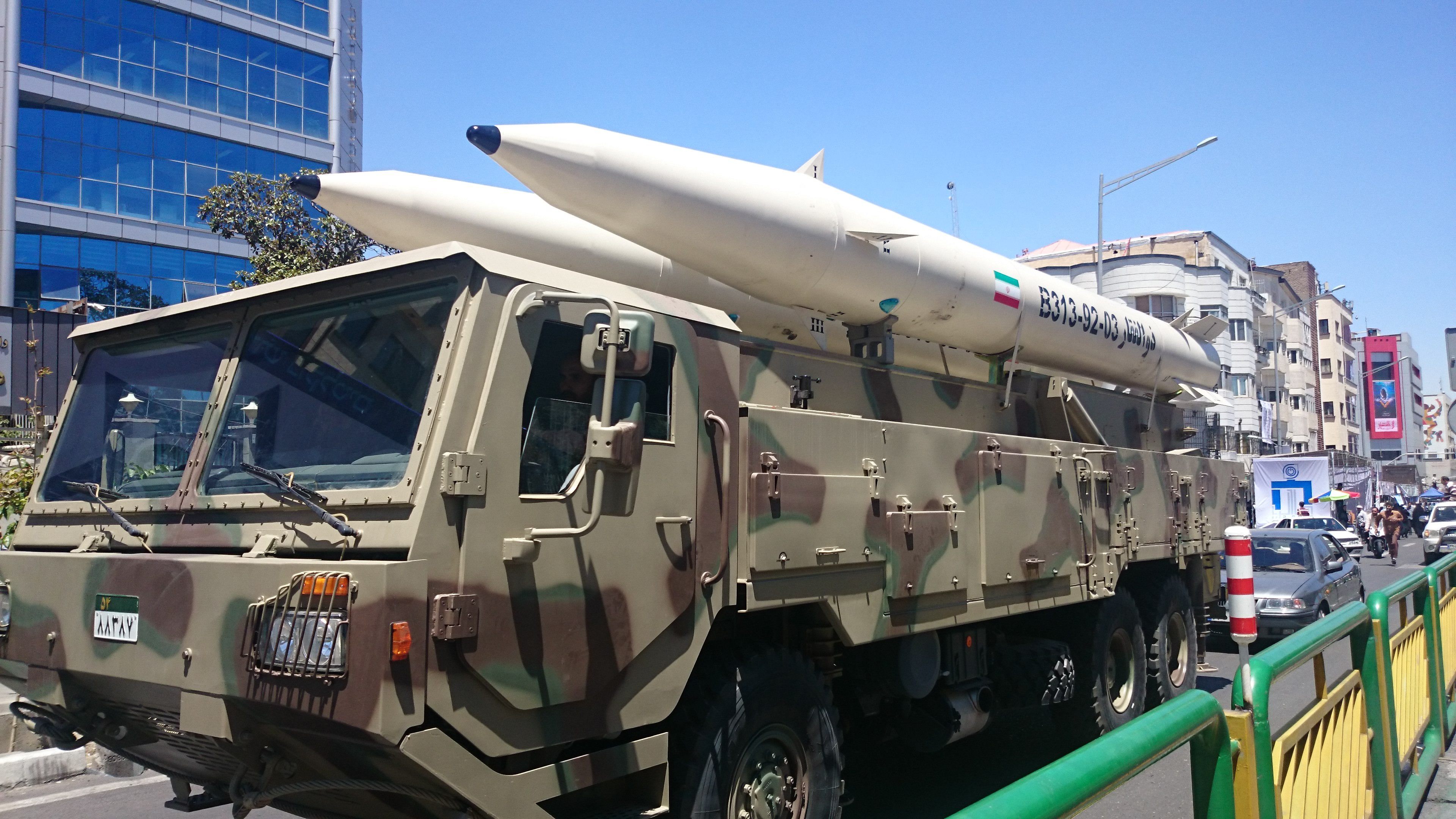 موشک ذولفقار در راهپیمایی روز قدس 96